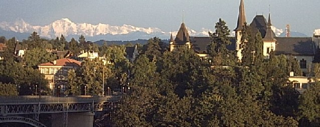 Aussicht von der Terrasse des 5*-Hotels Bellevue. Im Vordergrund die Kirchenfeldbrücke und das Historische Museum, im Hintergrund das Jungfrau-Massiv.